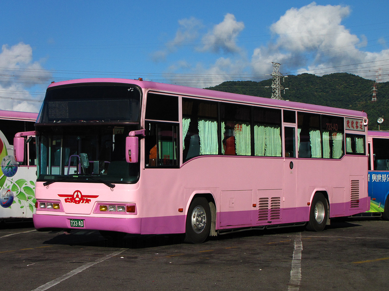 欣欣客運2006年HINO ERK1JRL大客車733-AD。